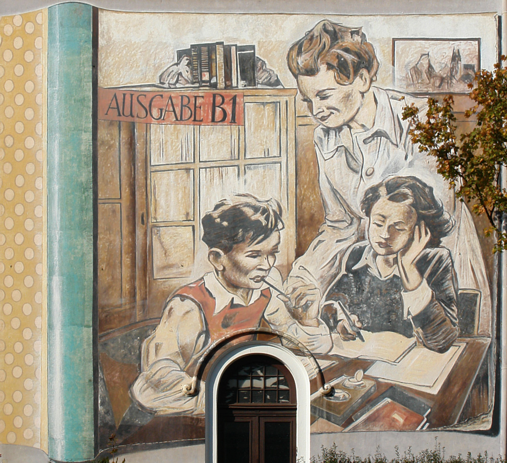 Wandbild in Bremen: Auf der Hohwisch 61-63. Titel: Frère Jacques, dormez-vous? Entwurf: Jub Mönster. Größe: 10 m x 10 m. Fertiggestellt: 1987